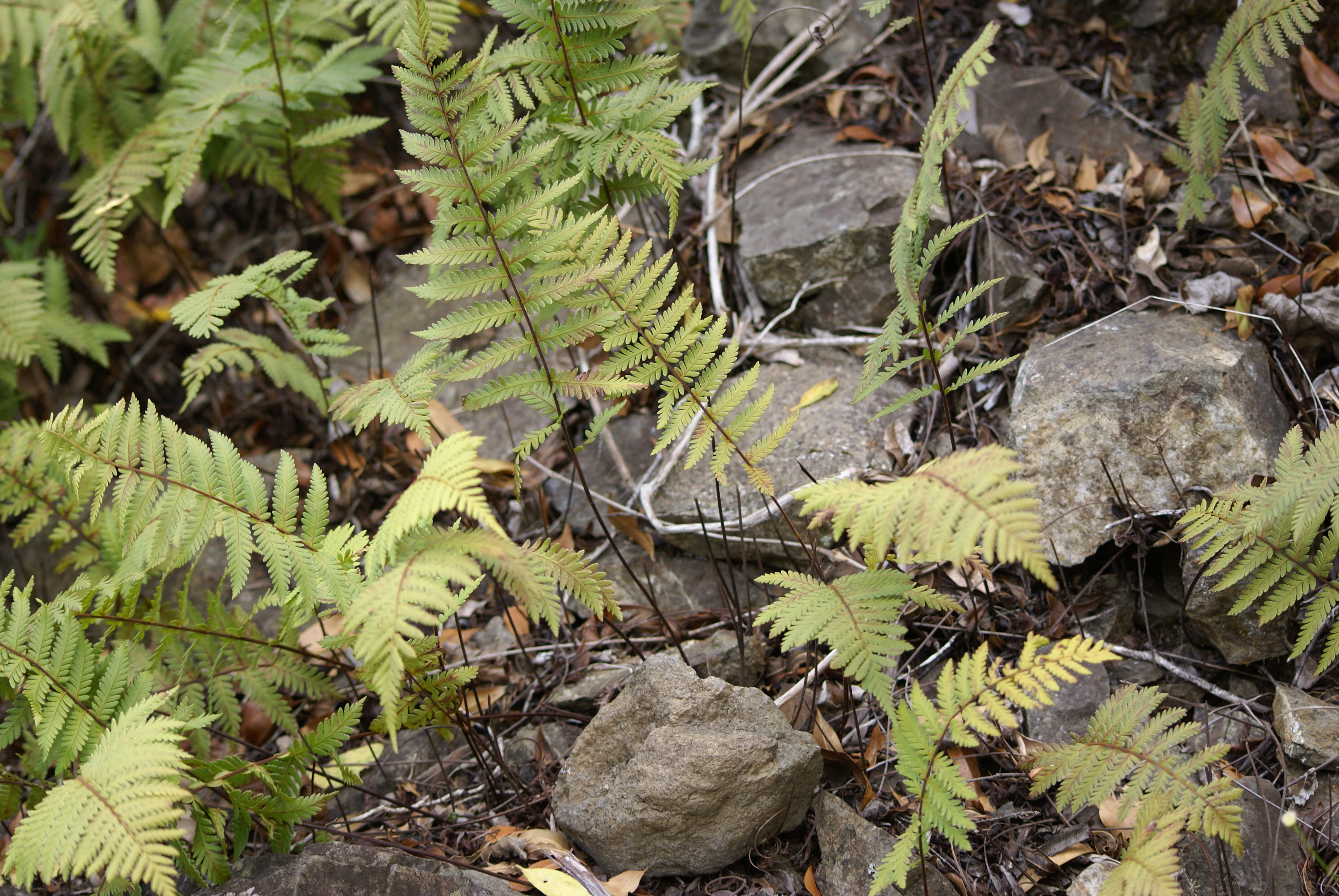 Arthropteris orientalis ( Cilaos )